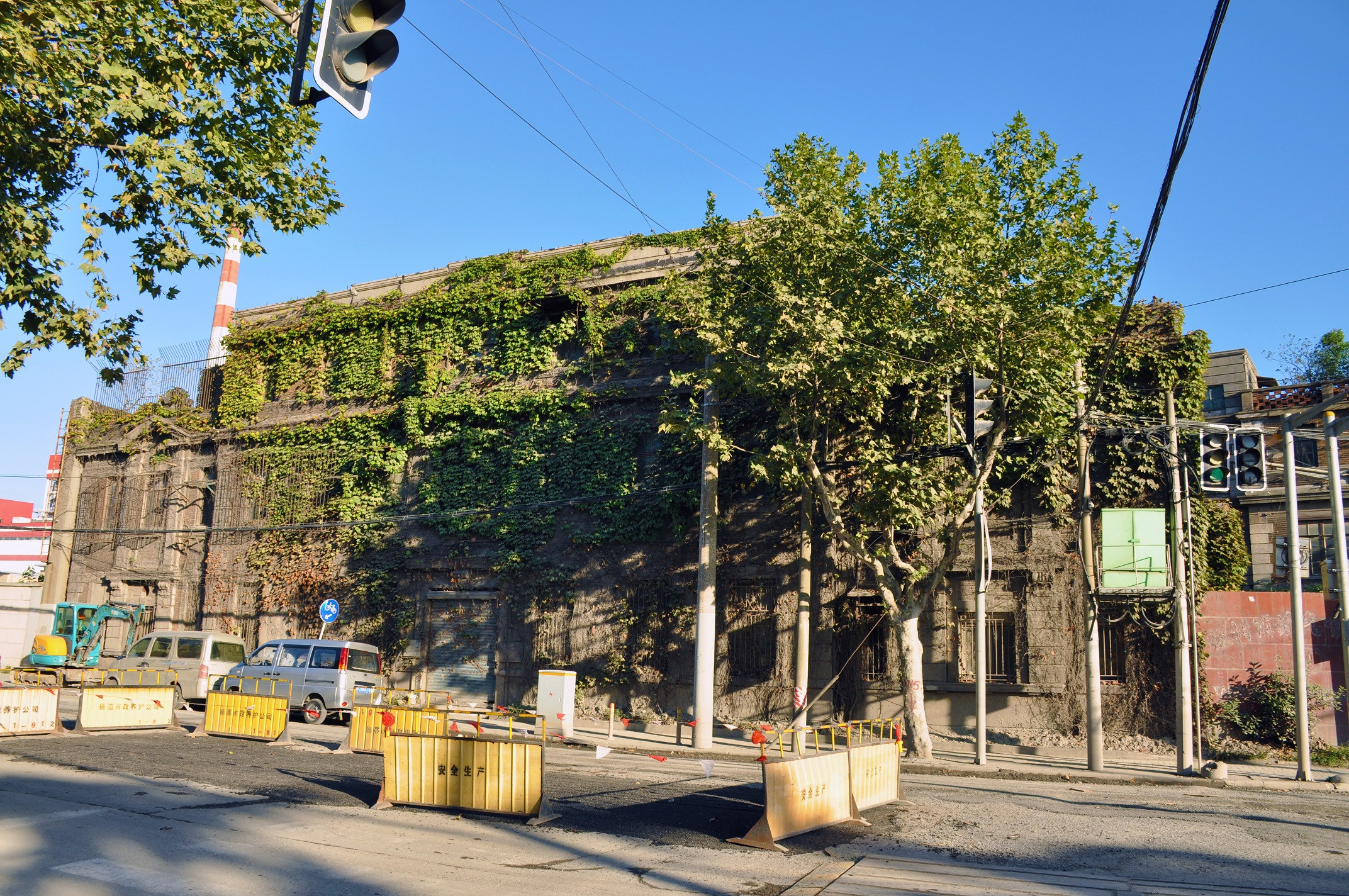 上海煤气公司杨树浦工场旧址 上海市杨树浦煤气厂办公楼 杨树浦路2524号